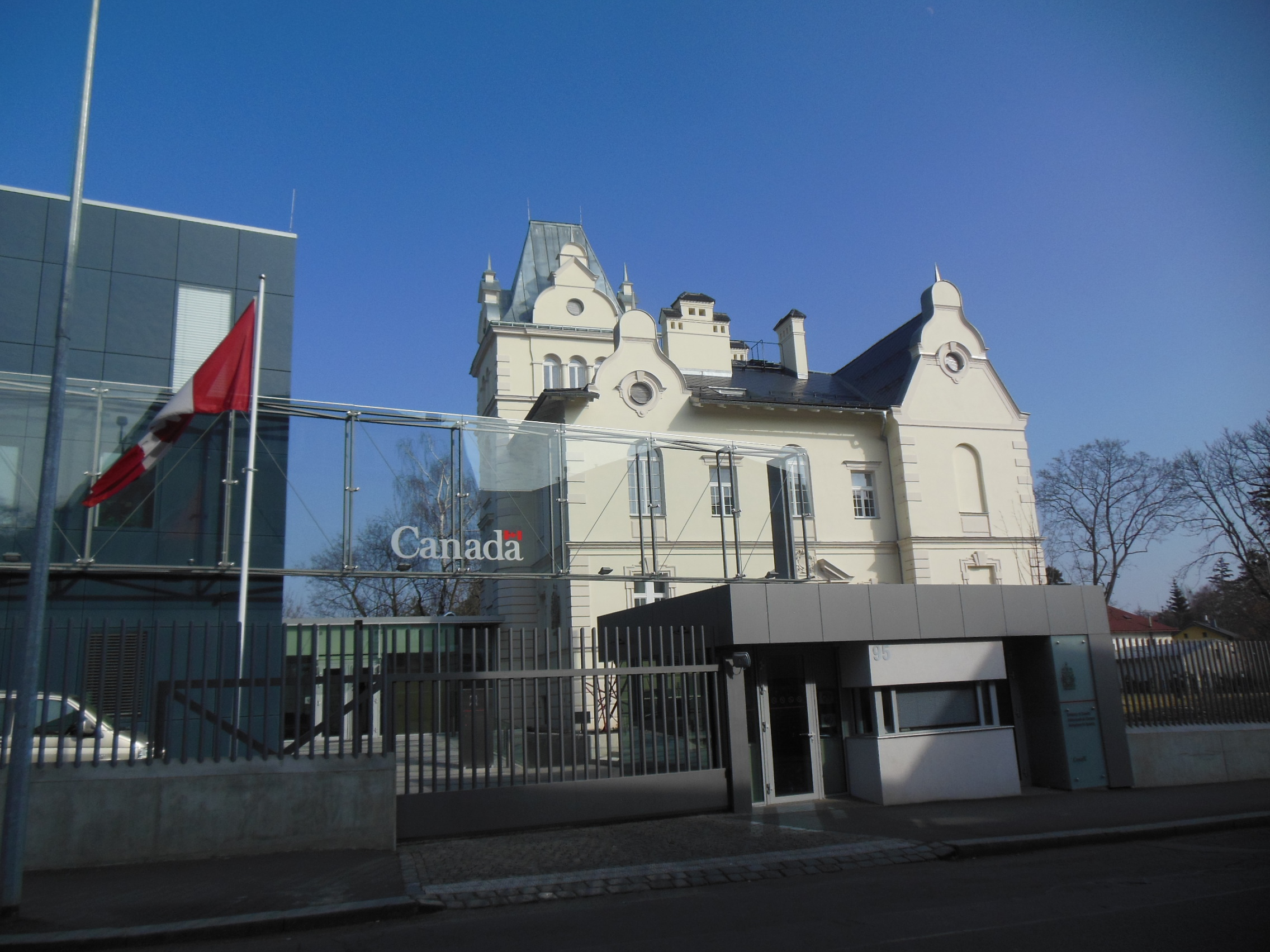 Praha-Bubeneč. Velvyslanectví Kanady č. 95/2 v ulici Ve struhách.